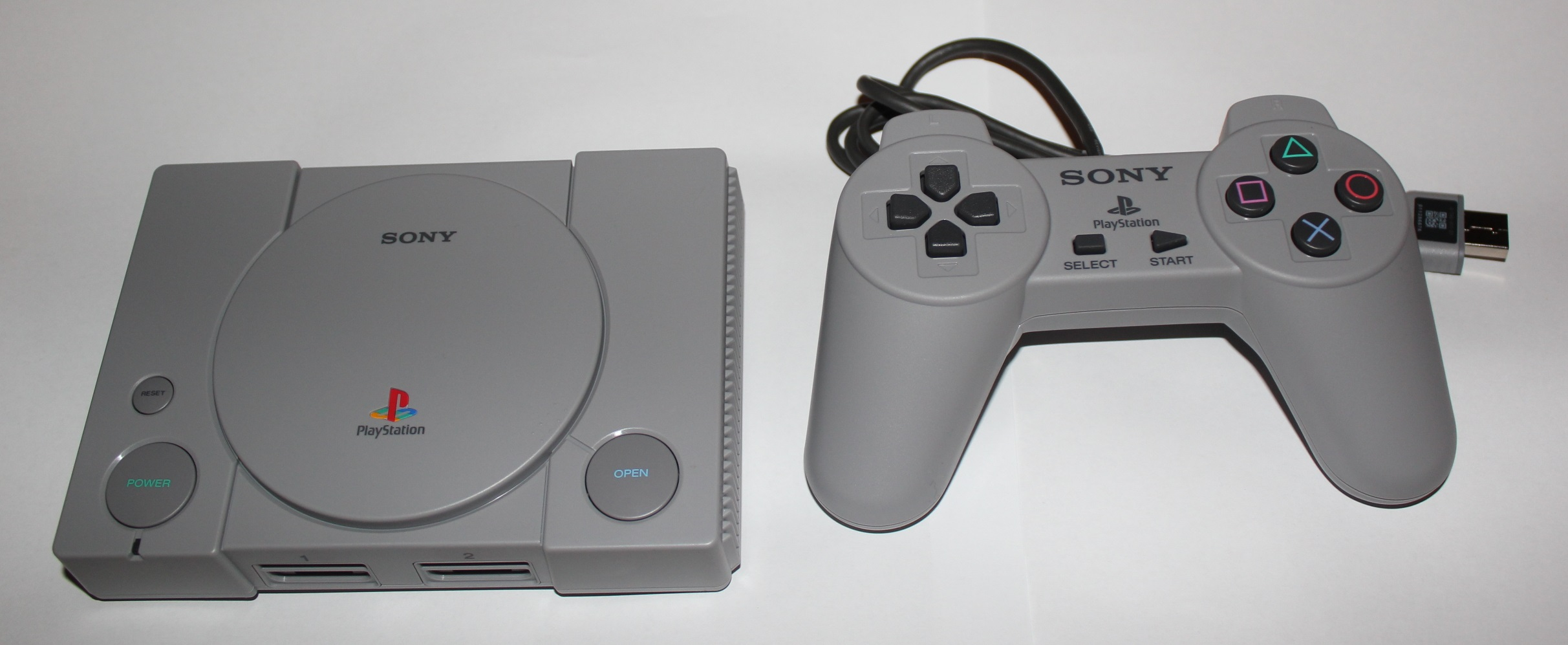 PlayStation Classic Konsole + Controller